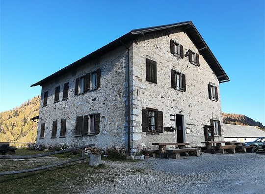 Categoria:Cadore